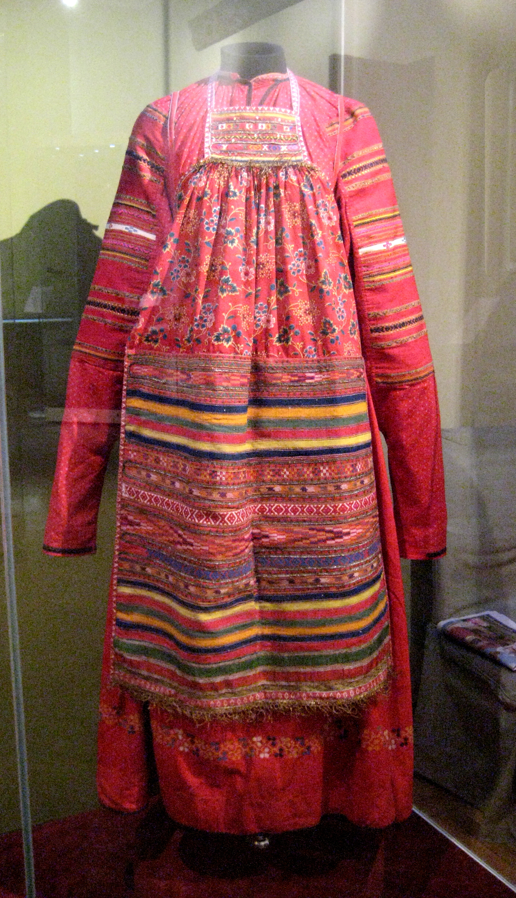 Женский праздничный костюм. Рубаха, сарафан, передник. Московская губерния, Верейский уезд. 2-я пол. 19 - начало 20 века.